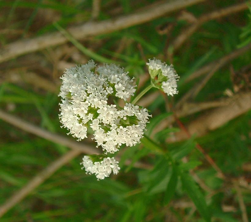 Valériane dioique, Gy, mai 2004